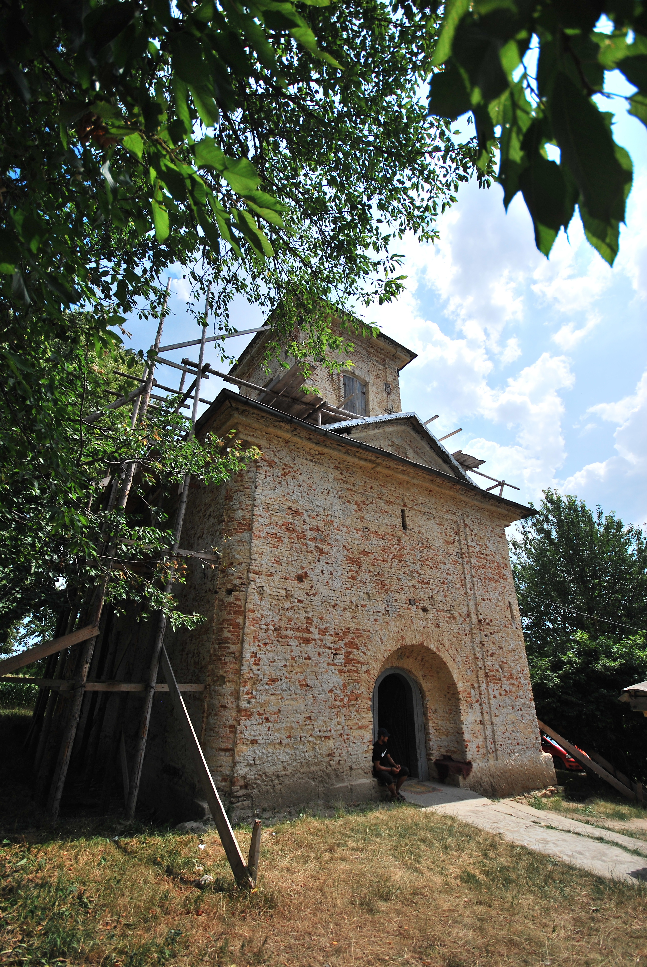 Biserica "Sf. Nicolae" și "Sf. Voievozi"